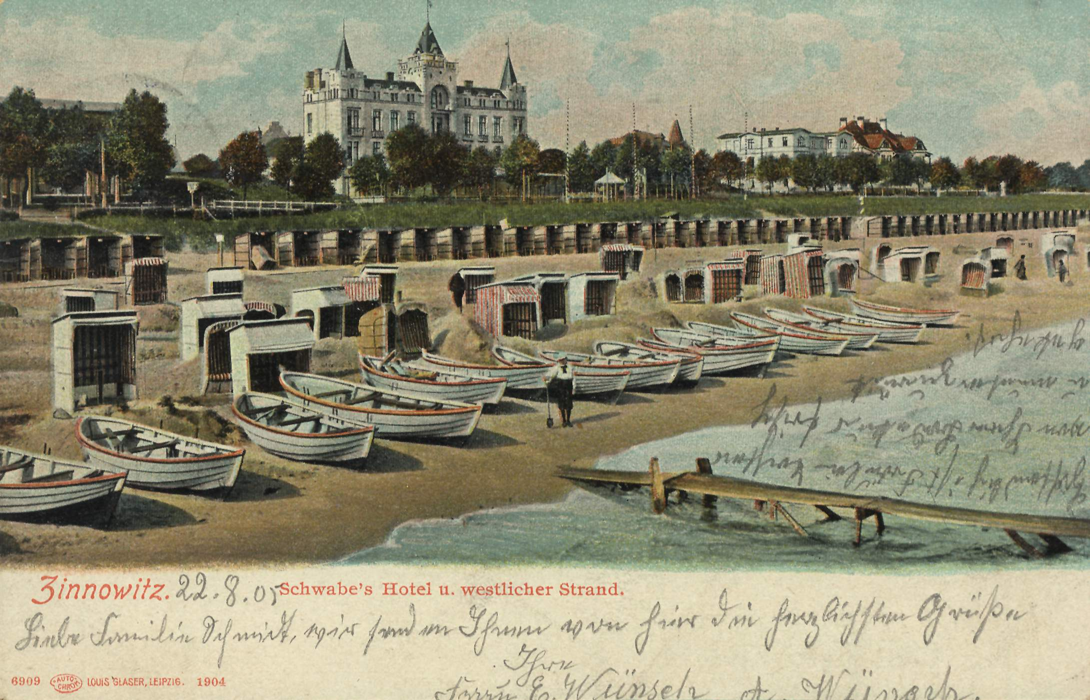 Zinnowitz. Schwabe's Hotel u. westlicher Strand.